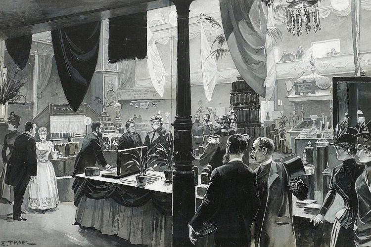 Die Eröffunung der I. internationalen Ausstellung für Volksernährung und Kochkunst